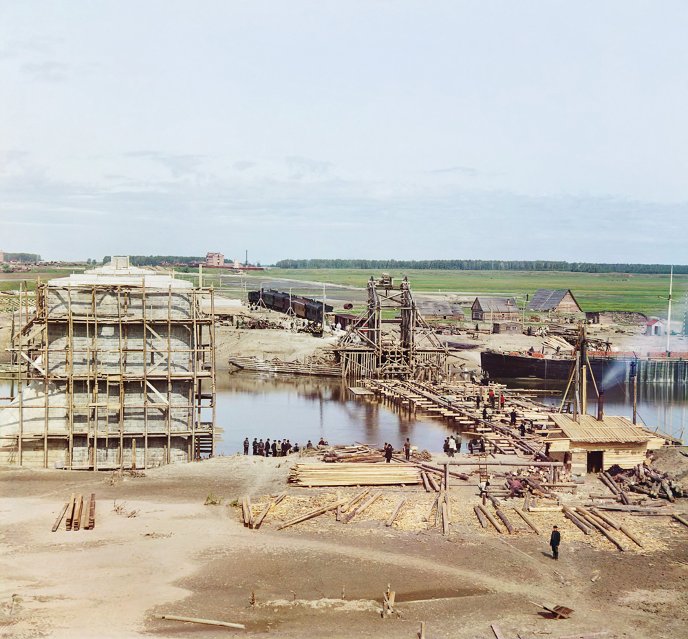 Строительство первого железнодорожного моста через р. Тобол на Транссибирской магистрали (Ялуторовск). Мост возведён по проекту инженера Е. К. Кнорре и удостоен золотой медали на Всемирной выставке в Париже. Фото С.М. Прокудина-Горского.